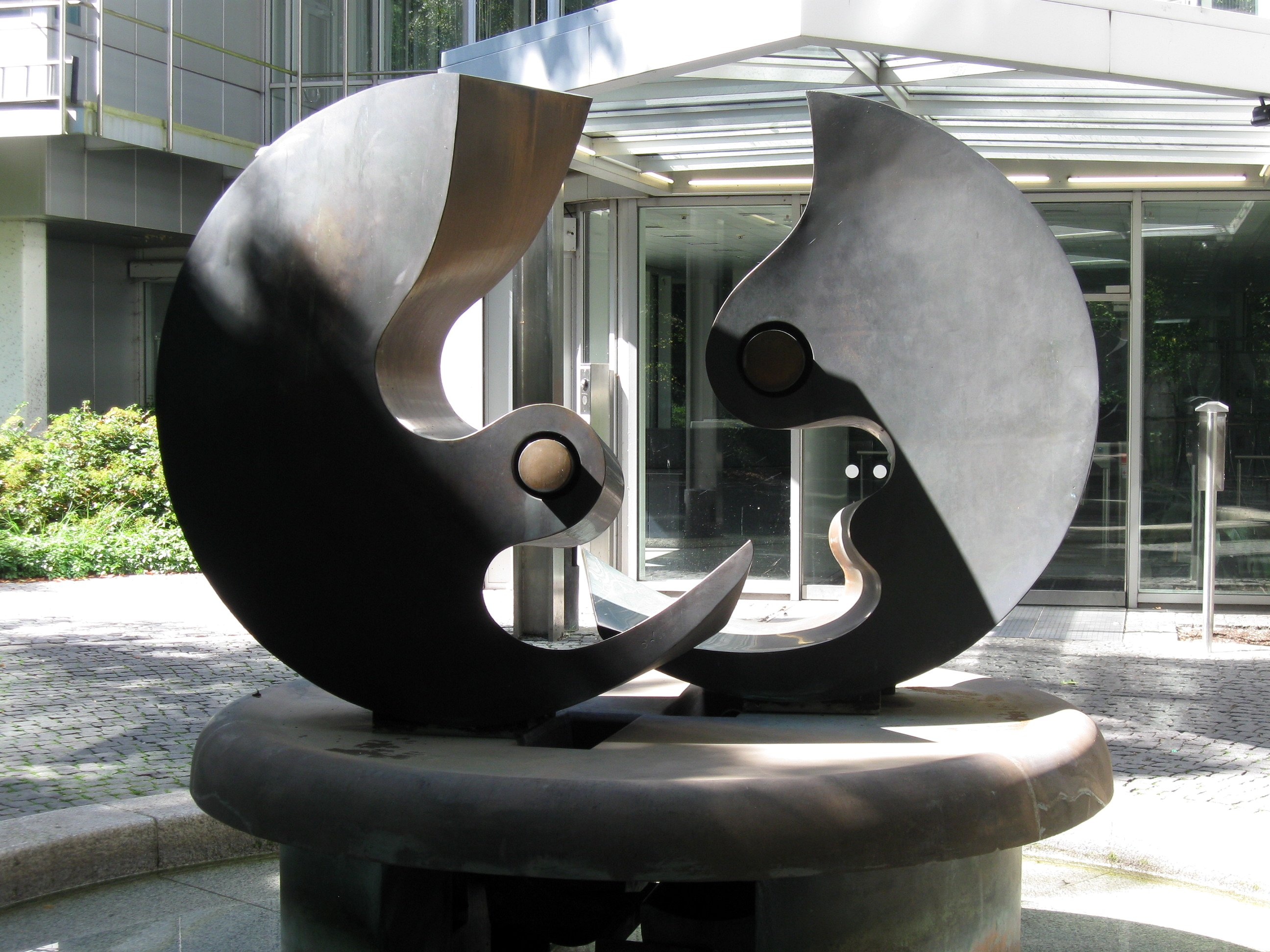 Otto Wesendonck: Ying-Yang Brunnen, Bronze, 1985, Tucherpark, München